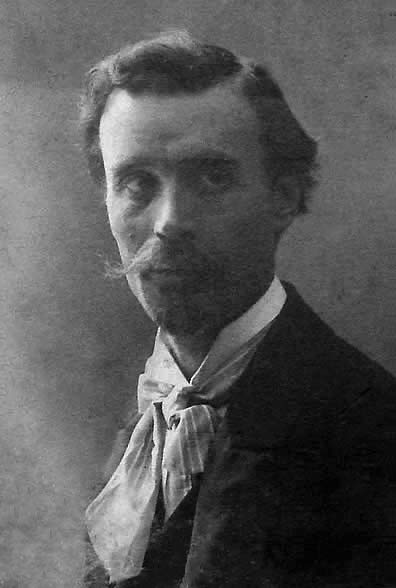 Anastas Bocarić in Belgrade